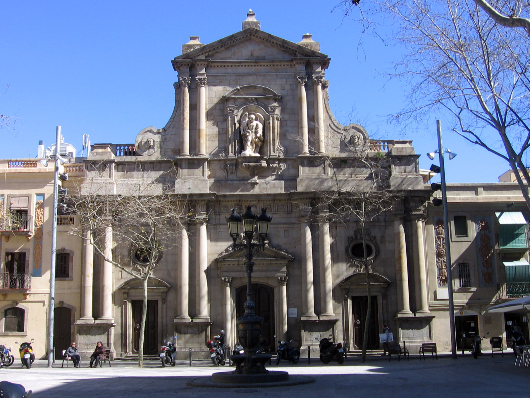 Iglesia de San Miguel del Puerto (1753), de Pedro Martín Cermeño, Barcelona.